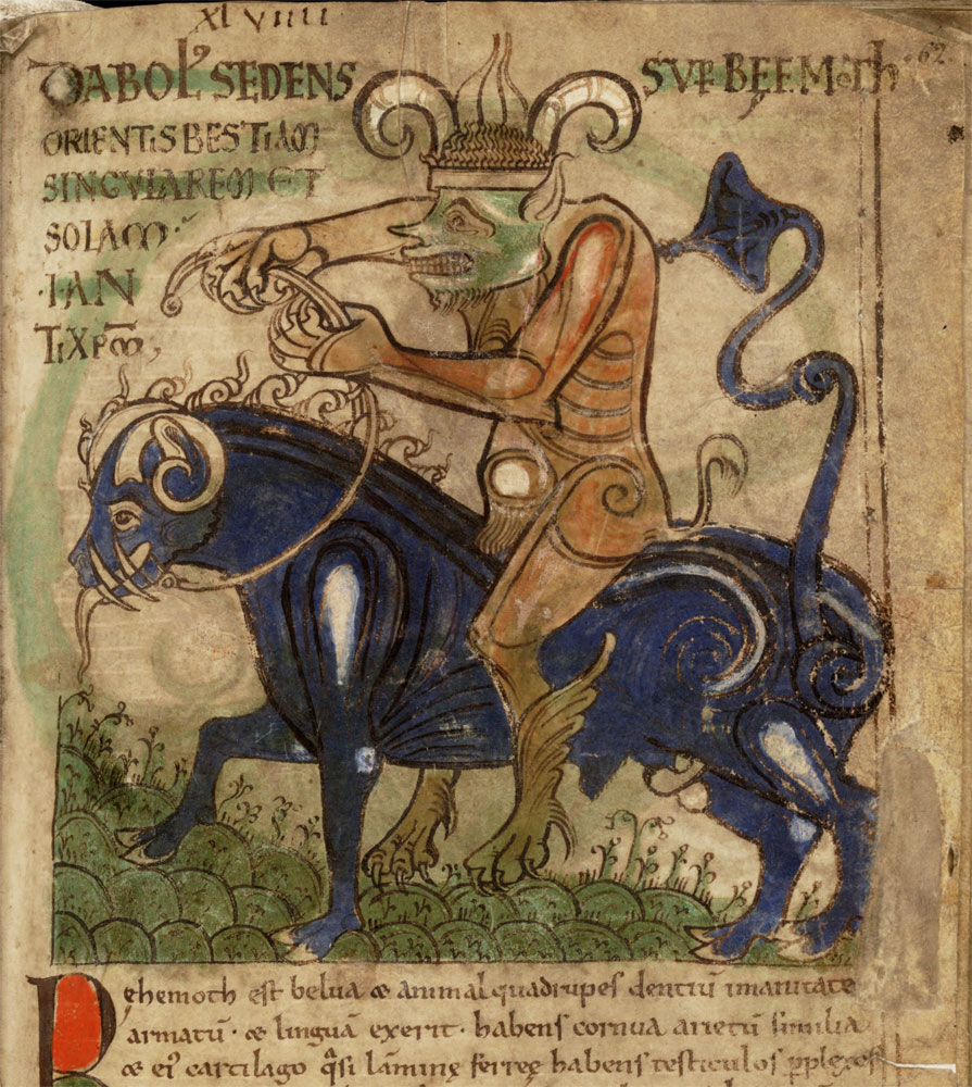 The Devil. Liber Floridus (Ghent University) 1120. (Google Books)